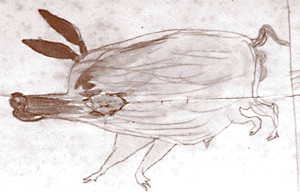 Zeichnung von Homer Davenport